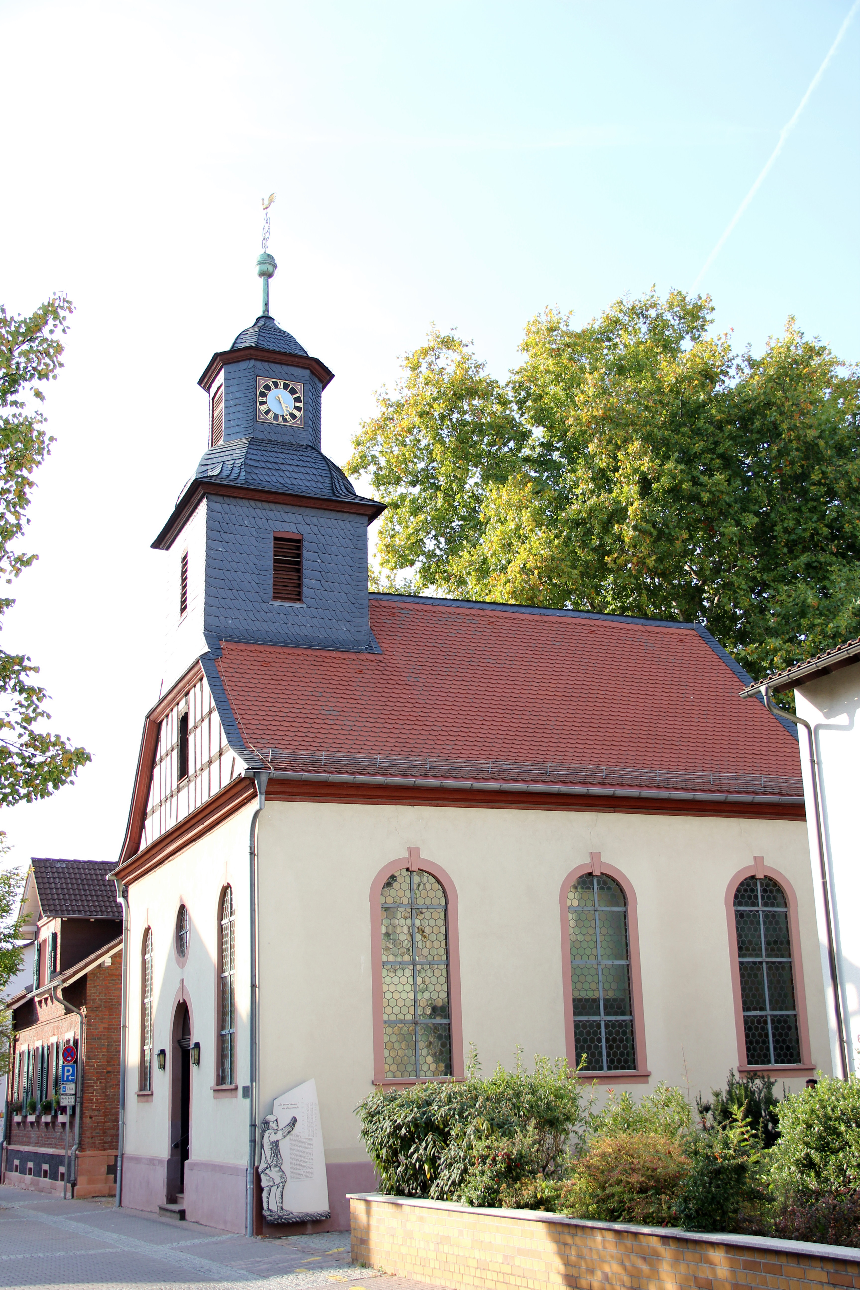 Die evangelische Kirche in Walldorf